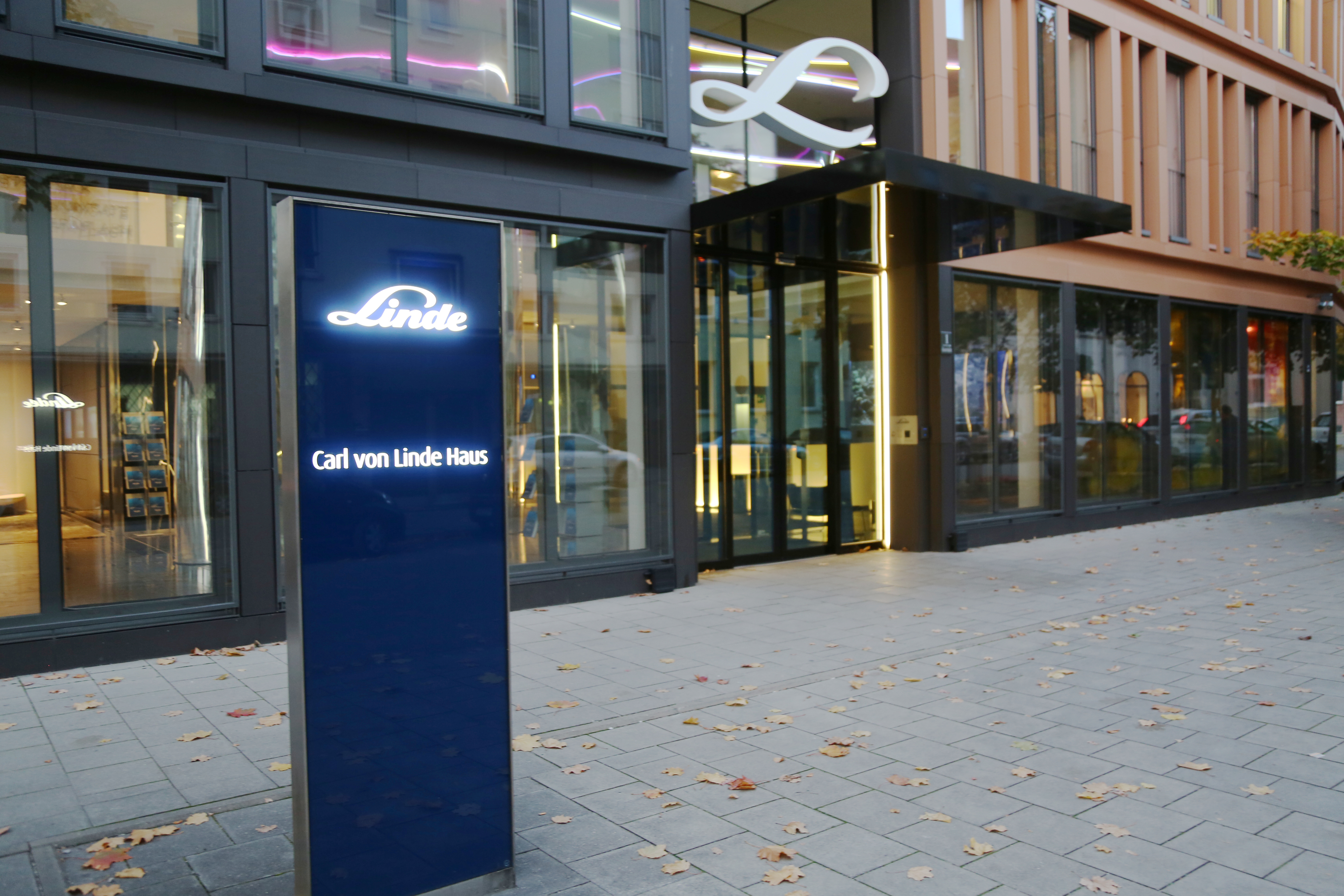 Carl-von-Linde-Haus ist der Name für die Konzernzentrale der Linde AG in München. Das Gebäude wurde als Angerhof errichtet